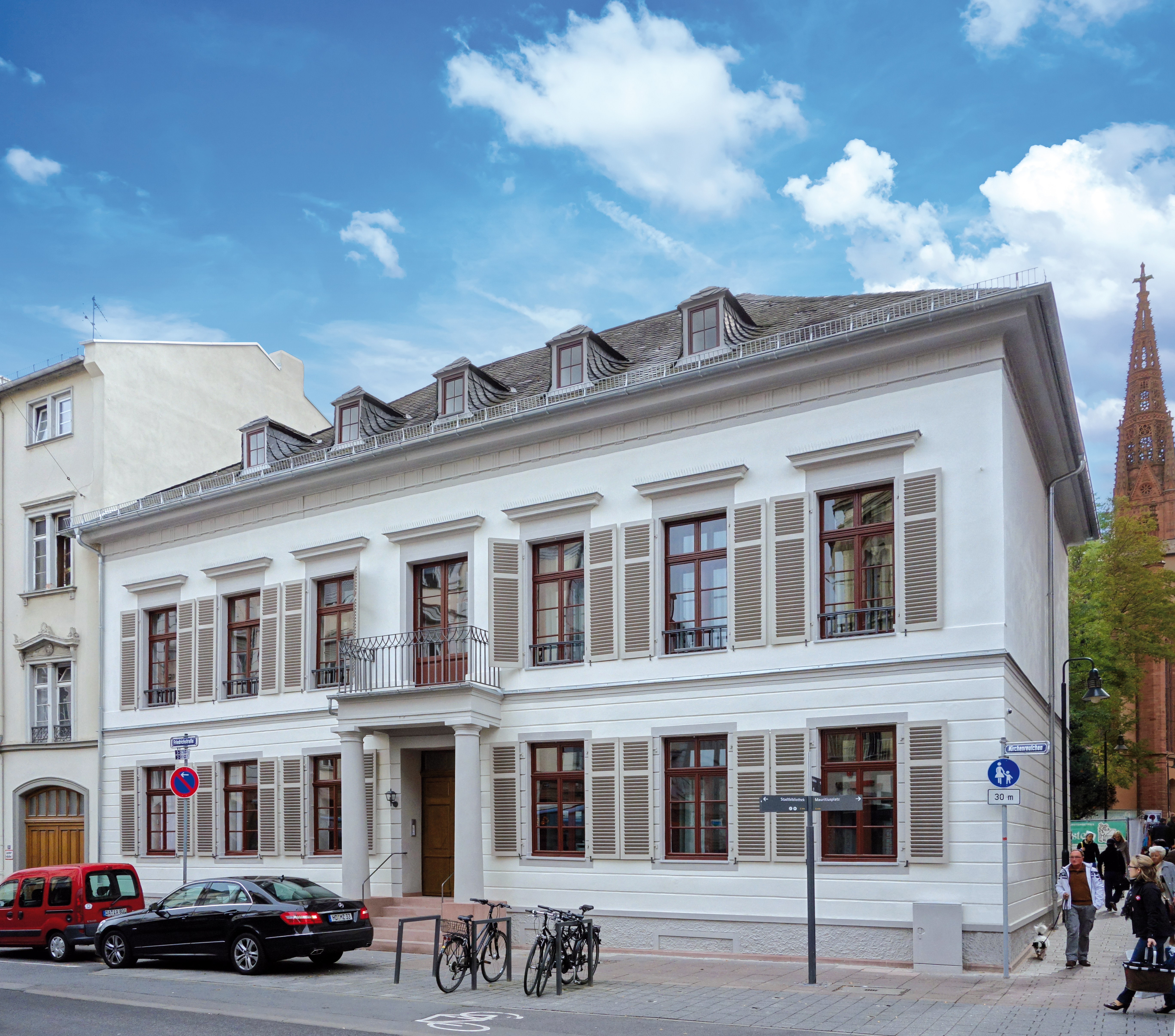 Das „Schenk'sche Haus“ in der Friedrichstraße in Wiesbaden, im Oktober 2012.